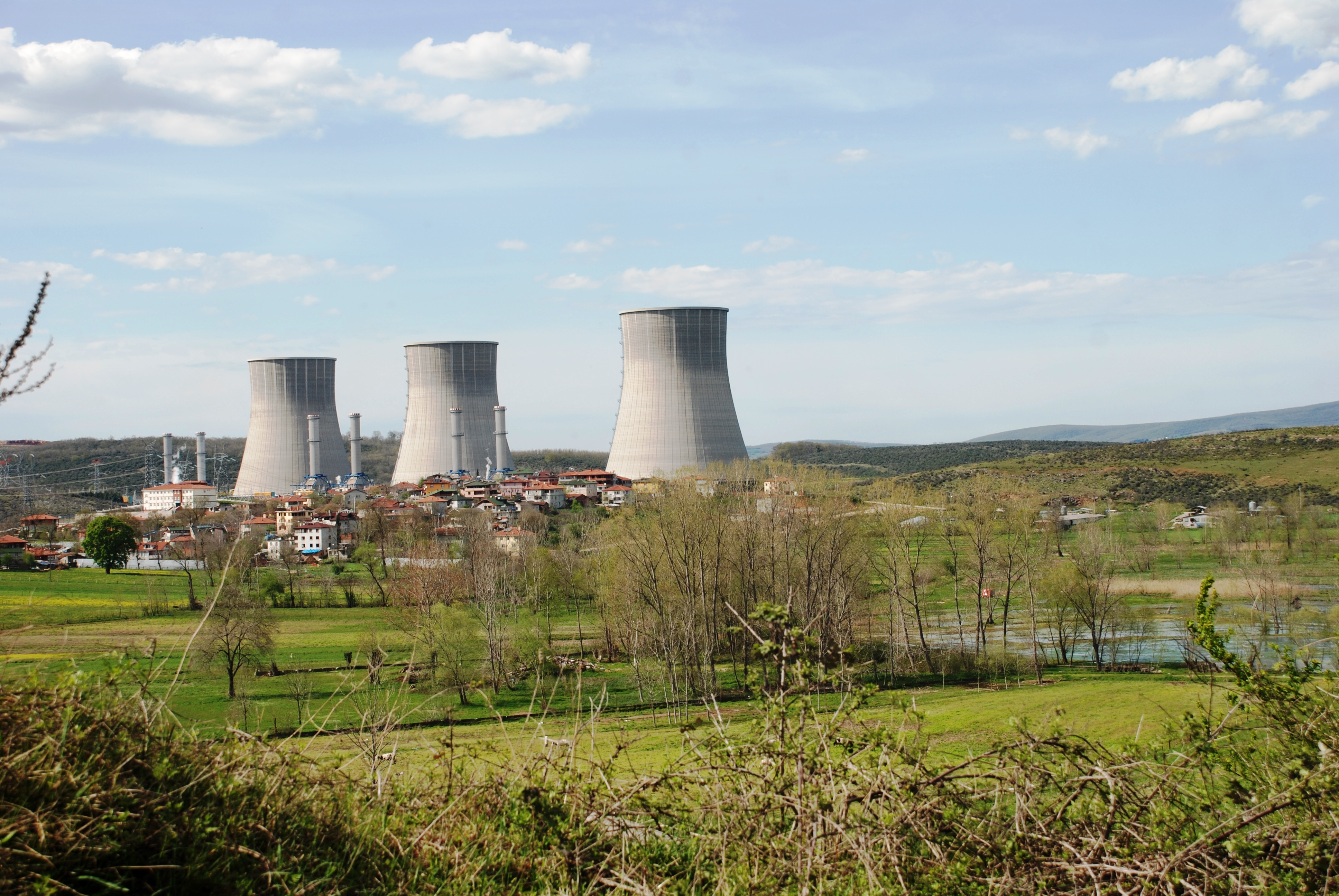 Taşkısığı Köyü ve Enkapower Adapazarı-Gebze Kombine Çevrim Santralleri